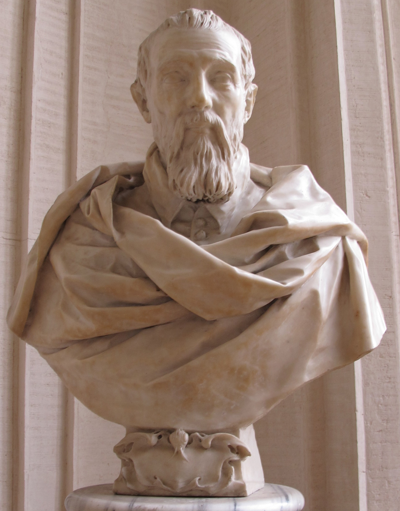 Gianlorenzo bernini, busto di antonio barberini